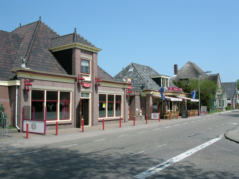 Dorpcentrum van Zwaag. Center of the village of Zwaag.